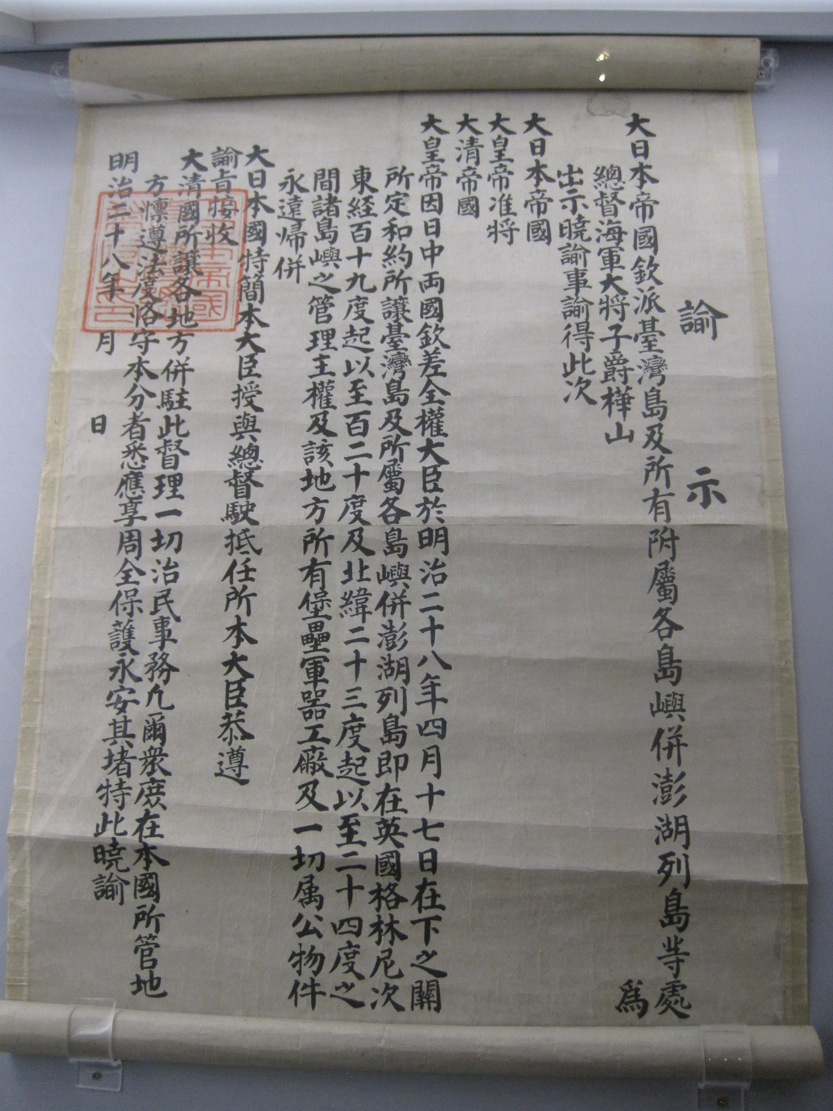 樺山資紀總督明治二十八年諭示。攝於臺灣歷史博物館。